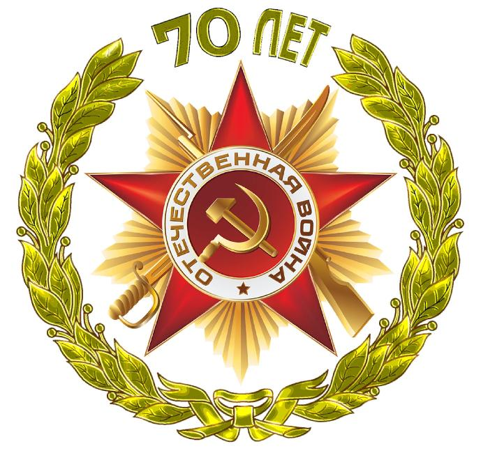 (The old version of the logo celebration) Ранний вариант эмблемы к 70-летию Победы в Великой Отечественной войне утвержденный на 34-ом заседании Российского организационного комитета «Победа» 12 июля 2013 года, под председательством Президента Российской Федерации, представлял собой многоцветное изображение знака ордена Отечественной войны I степени в обрамлении золотых лавровых ветвей. Между ветвями расположена надпись золотого цвета: «70 ЛЕТ». Эмблема могла изображаться в одноцветном варианте. Автор эмблемы — заслуженный художник Российской Федерации Н. И. Уколов